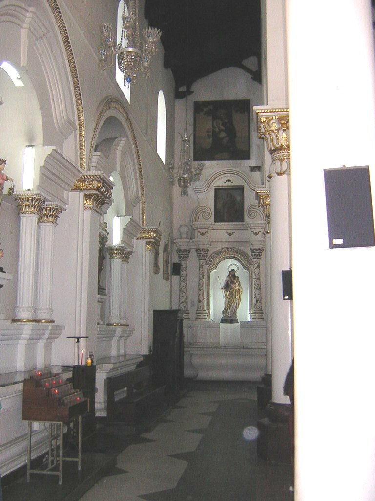 Iglesia La Veracruz, Medellín, Colombia